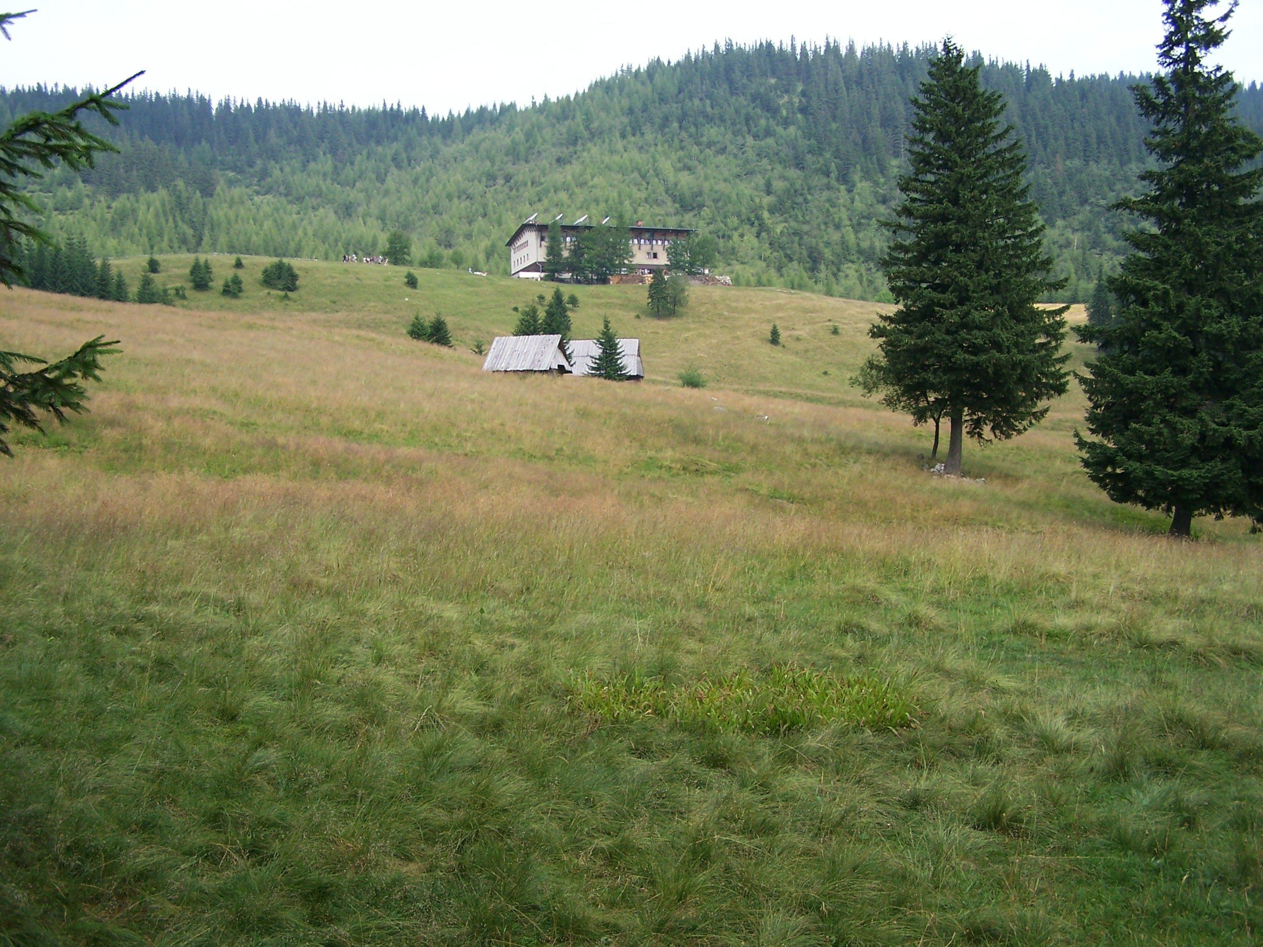 Kalatówki